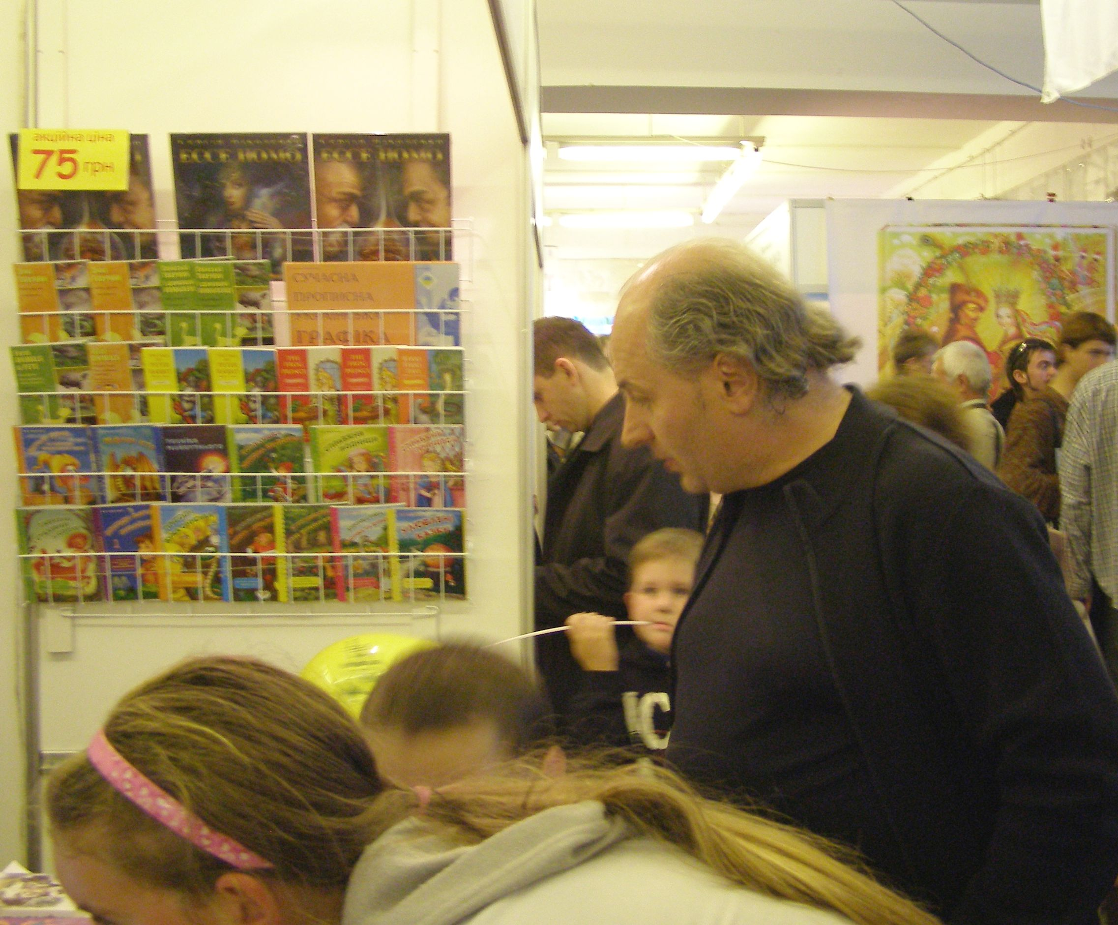 Iwan Malkowytsch, Direktor des «A-BA-BA-HA-LA-MA-HA» Verlag, während dem Lemberger Buchforum 2008